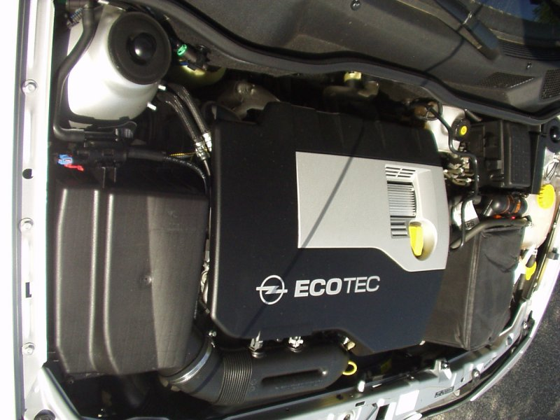 (Z22SE)Motor, 147 PS